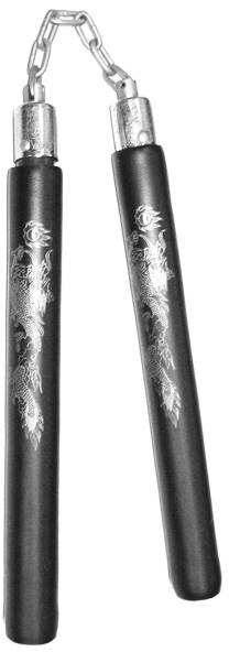 Nunchaku, Waffe in verschiedenen Kampfsportarten